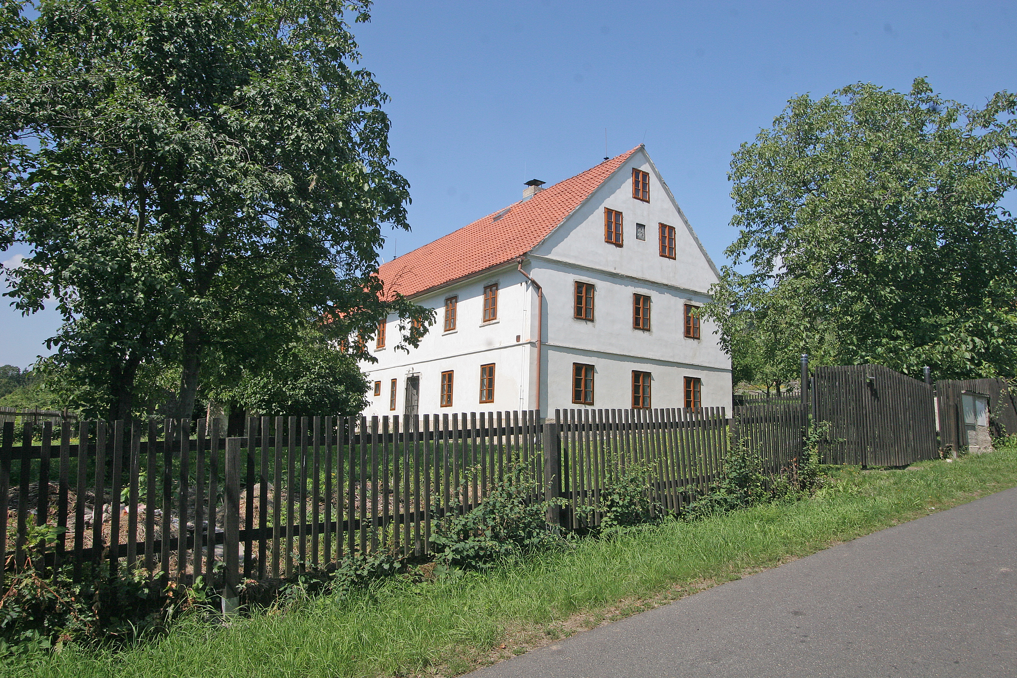 Bílý Kostelec čp. 24